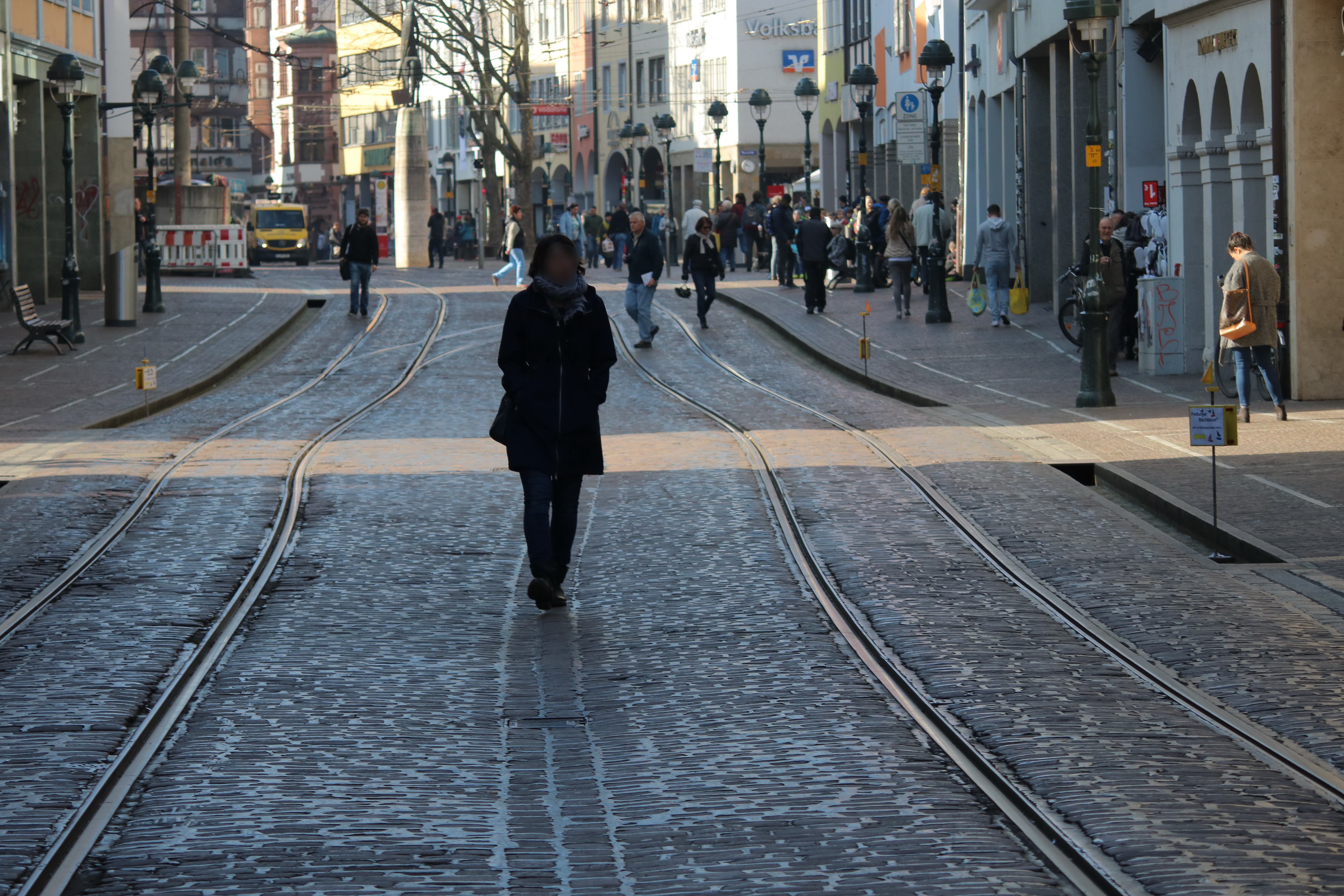 Freiburg im Breisgau, Kaiser-Joseph-Straße, Schlenker der Straßenbahnschienen um den ehemaligen Fischbrunnen unmittelbar vor dessen Beseitigung im Jahr 2017.